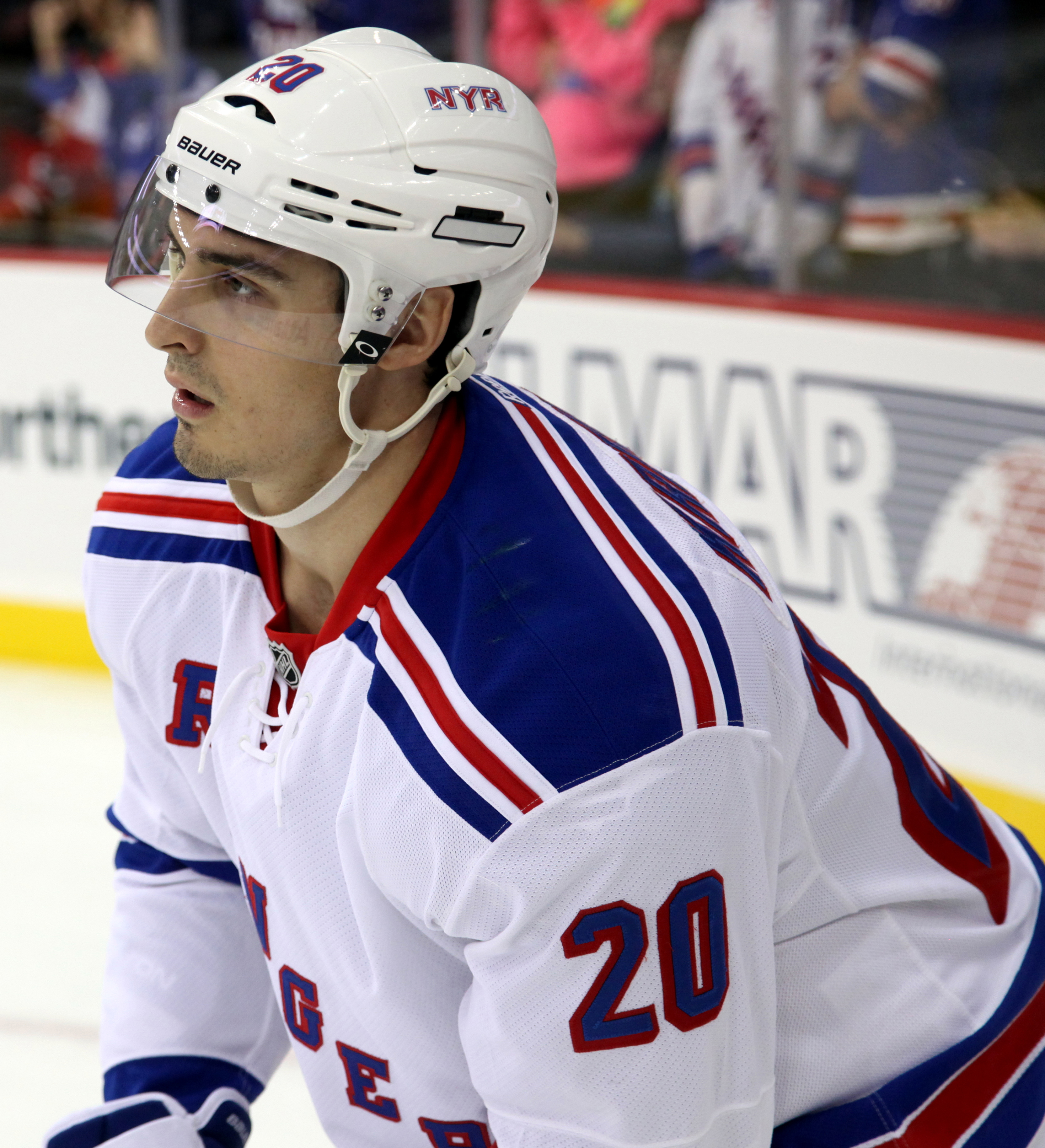 Kreider as a Ranger in October 2014.